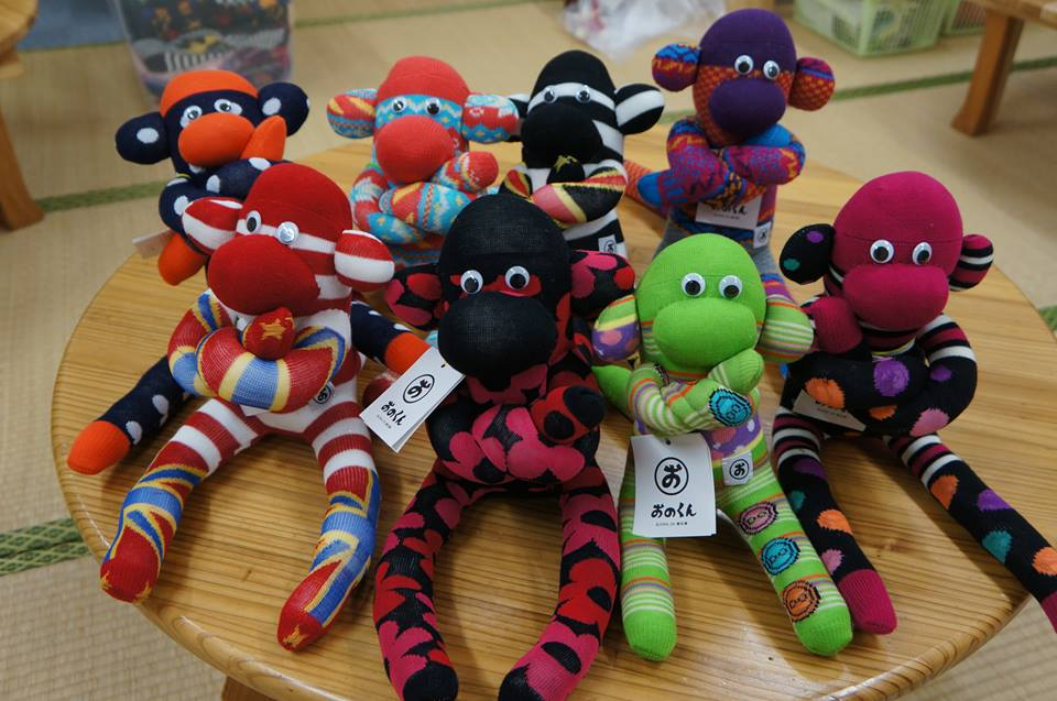 小野駅前応急仮設住宅で作られているおのくん